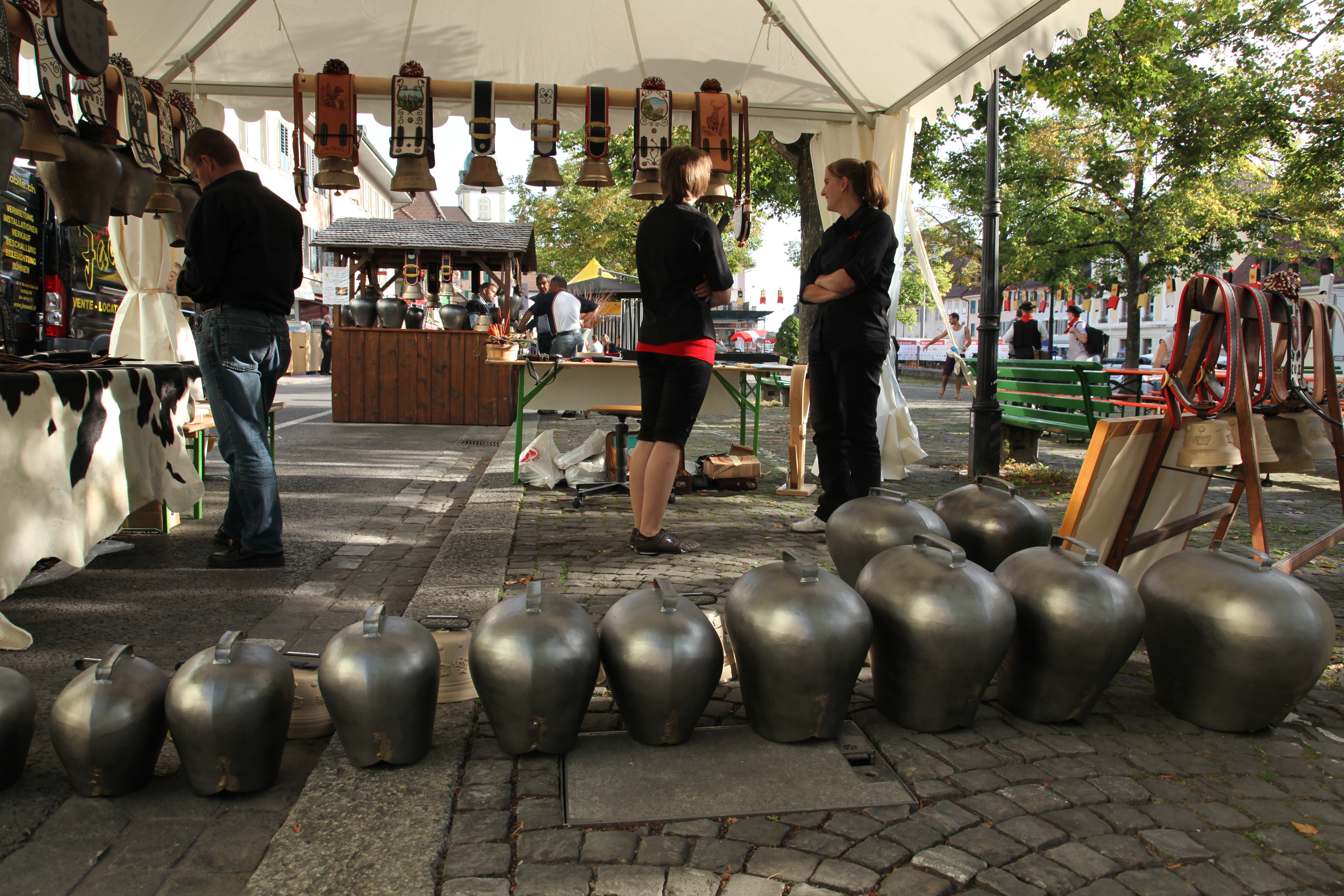 Instantanés de la Fête fédérale des sonneurs de cloches à Bulle (canton de Fribourg en Suisse). Après-midi du samedi 3 septembre 2011. Photo: Pierre Schwaller